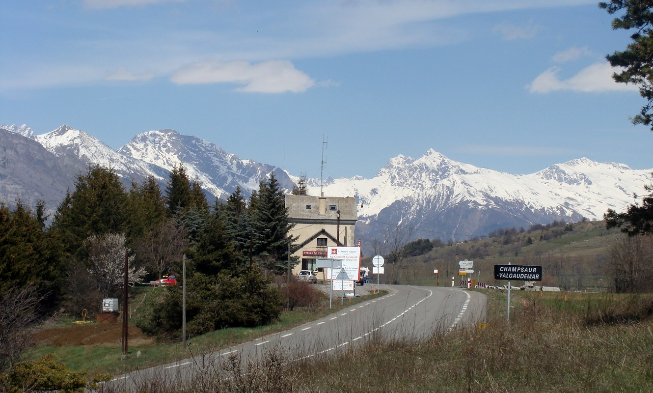 Le col de Manse vu depuis le sud (avant la déviation de la RD 944).